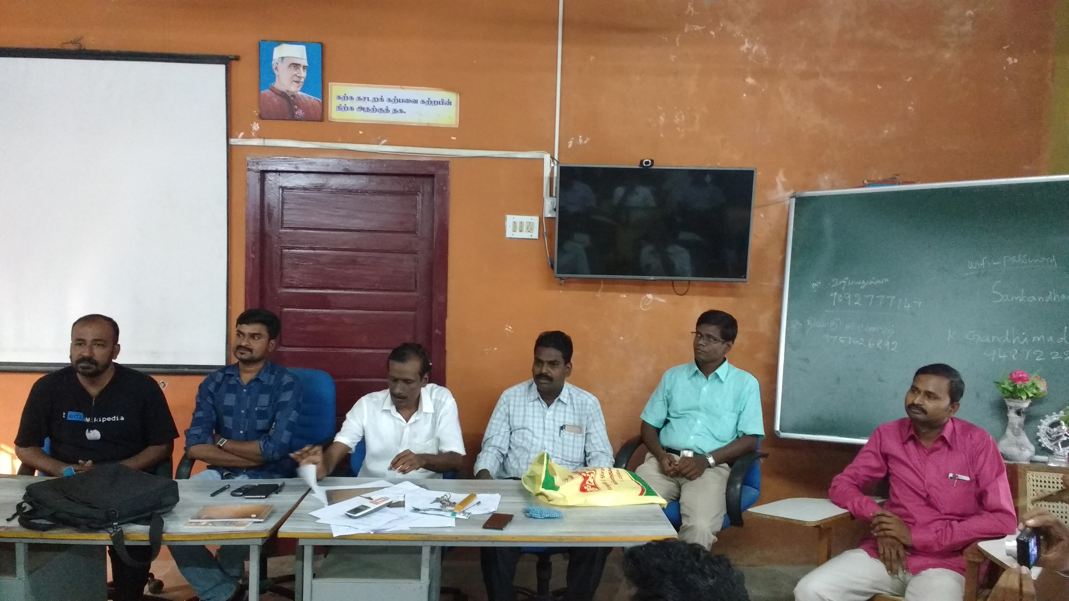 ஆடுதுறை மாவட்ட ஆசிரியர் கல்வி மற்றும் பயிற்சி நிறுவனத்தில் தமிழ் விக்கிப்பீடியா பயிற்சி